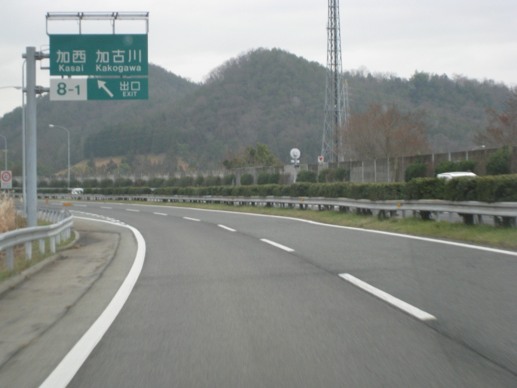 加西インターチェンジの案内板